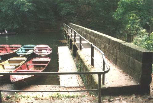 Boote an der Staumauer am Amselsee Rathen, Sächsische Schweiz